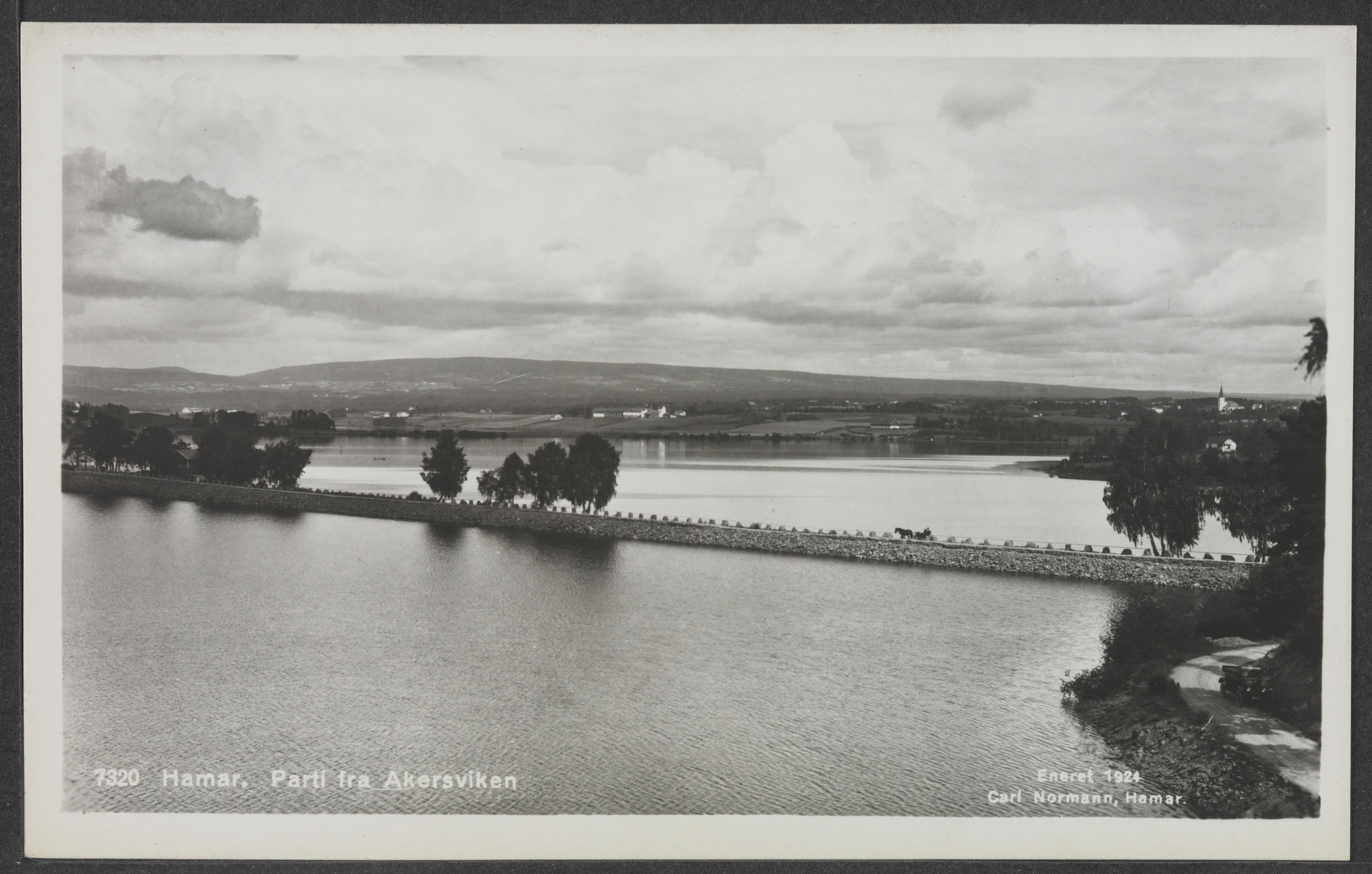 Bildet er hentet fra Nasjonalbibliotekets bildesamling Akersvika, Hamar, Hedmark